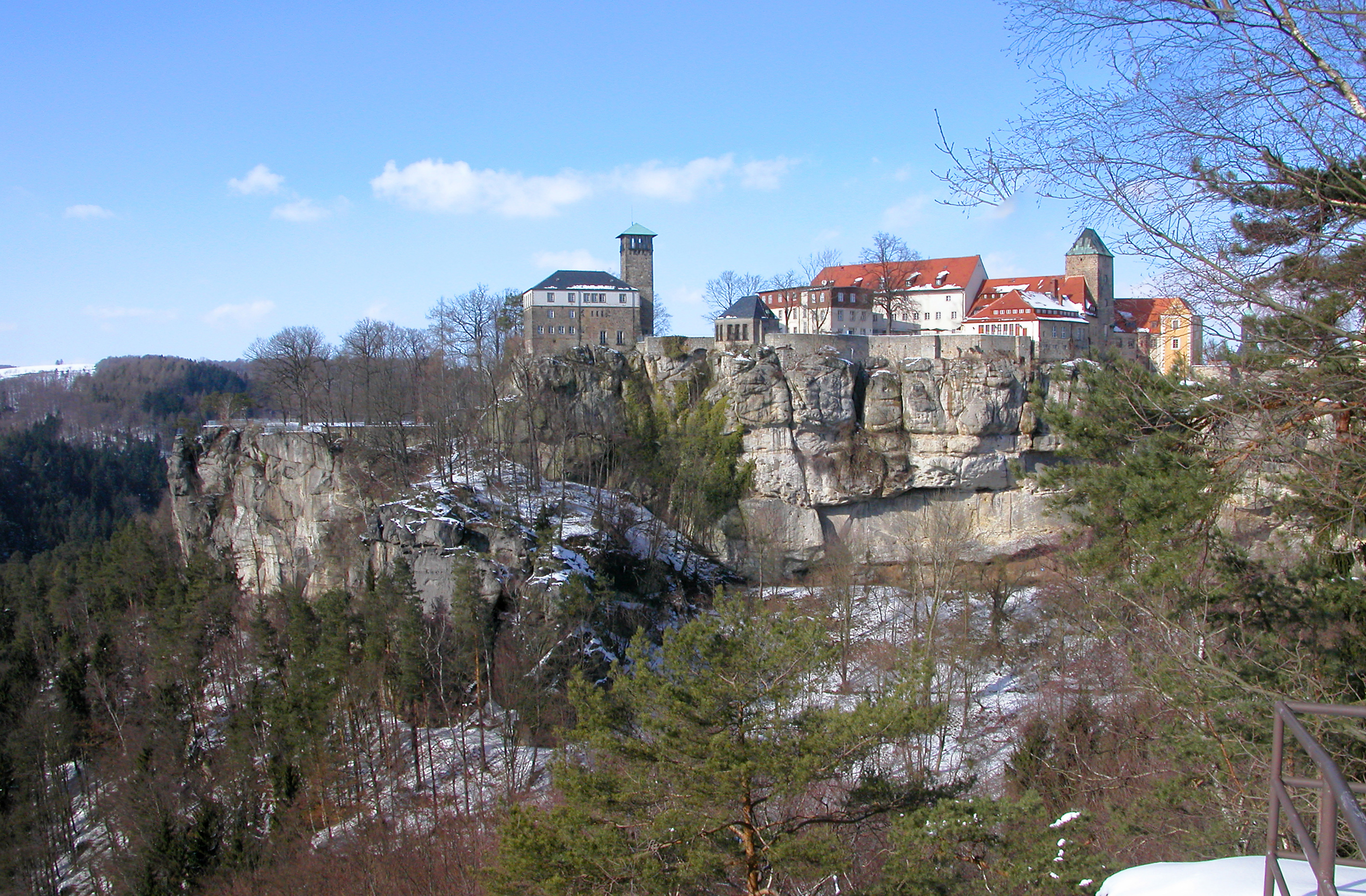 05.03.2006 01848 Hohnstein: Burg (GMP: 50.976628,14.109229). Ursprünge im 15 und 16. Jahrhundert. Blick von Südosten über den Bärengarten zur Burg Hohnstein. [DSCN8862+8863.TIF]20060305290MDR.JPG(c)Blobelt